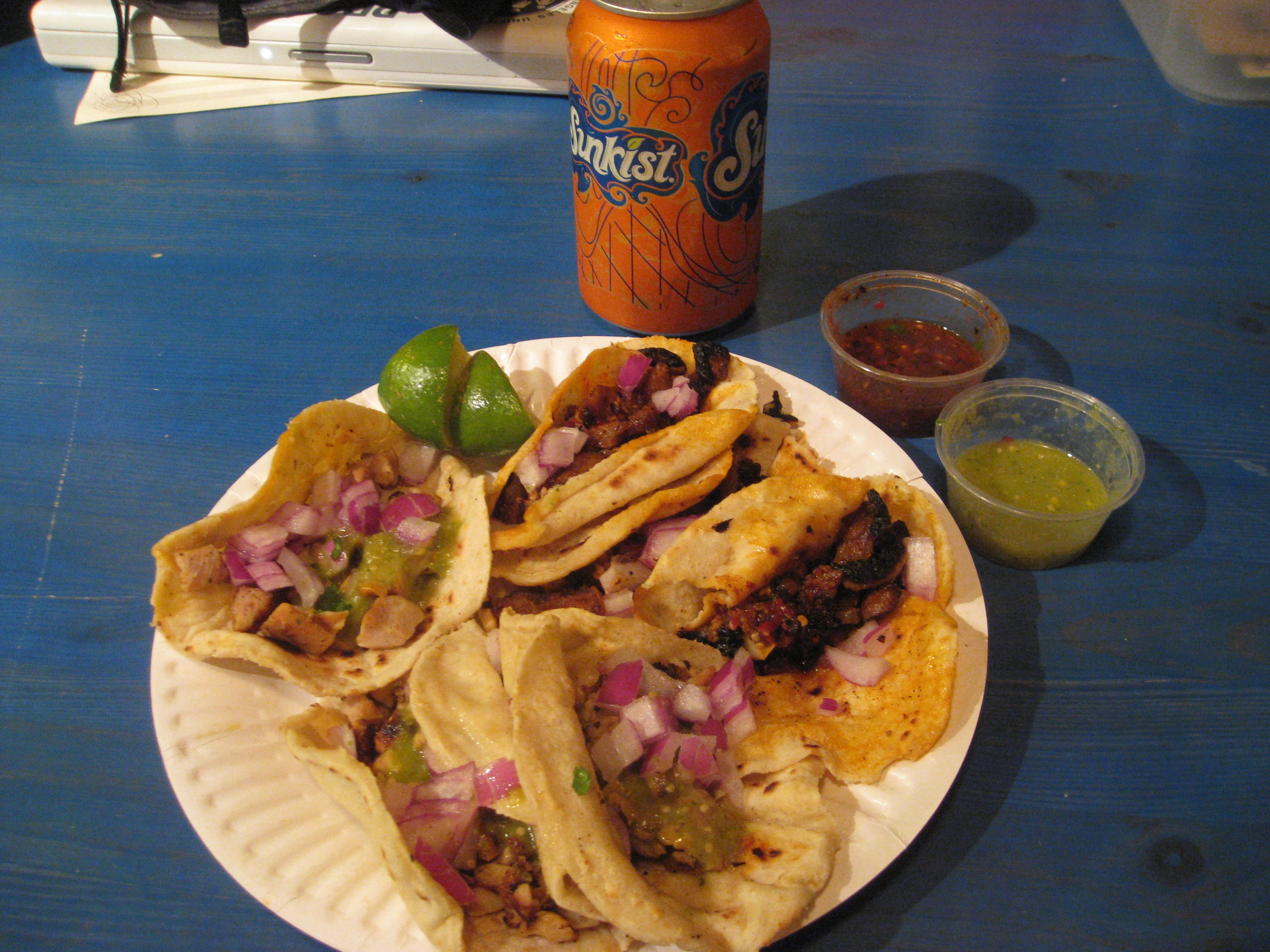 Tacos al pastor, pollo and a sunkist